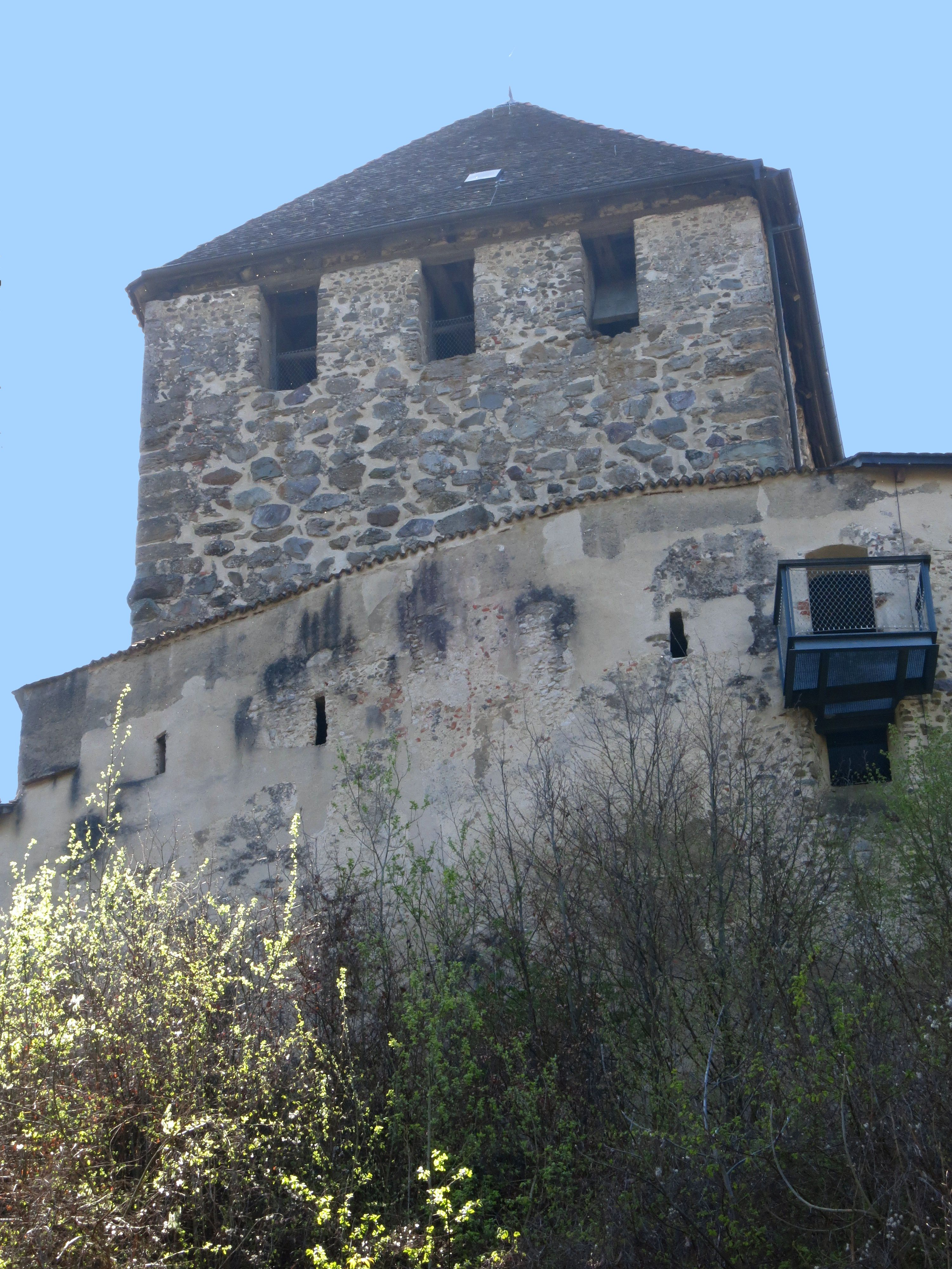 Turm der Burg Hohenklingen